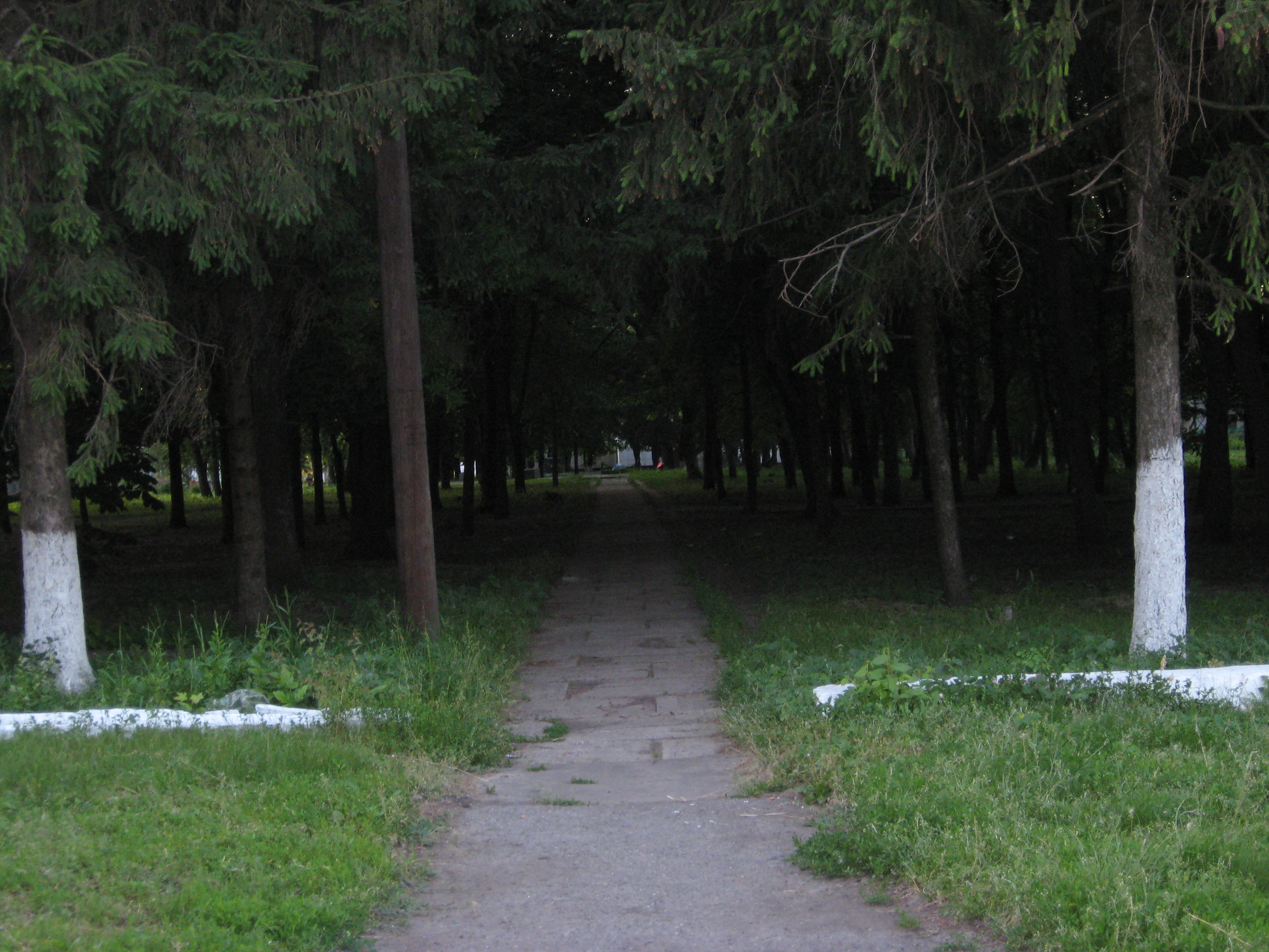 Парк с.Василівка Чутівський район